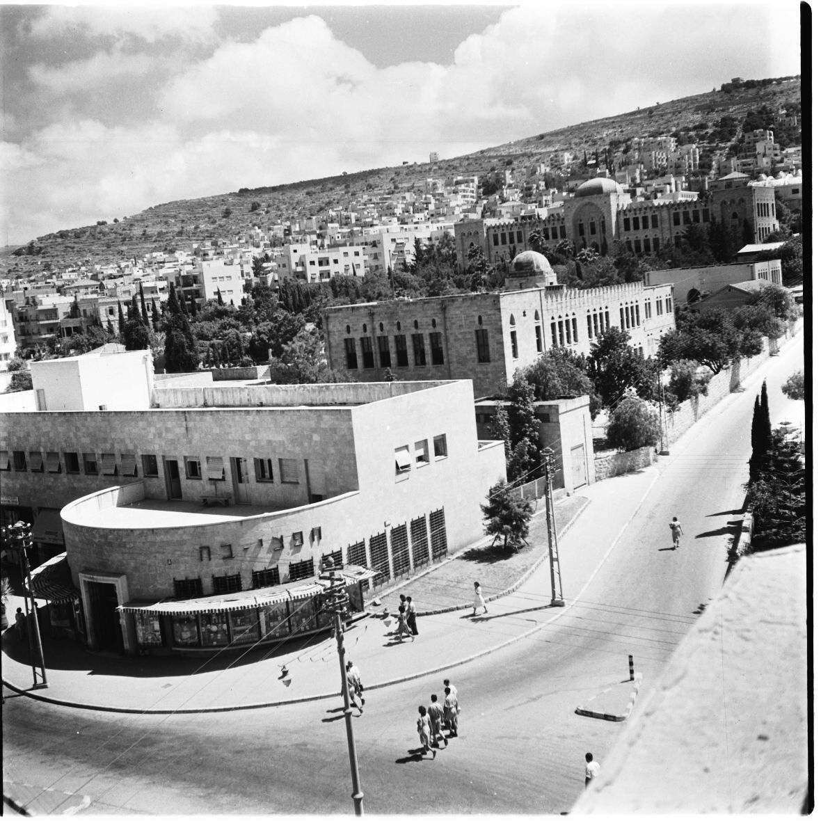 אוסף צילומים של הצלם זולטן קלוגר טווח מספרי התשלילים 30890 - 30999: חיפה - הדר הכרמל - בית הקרנות